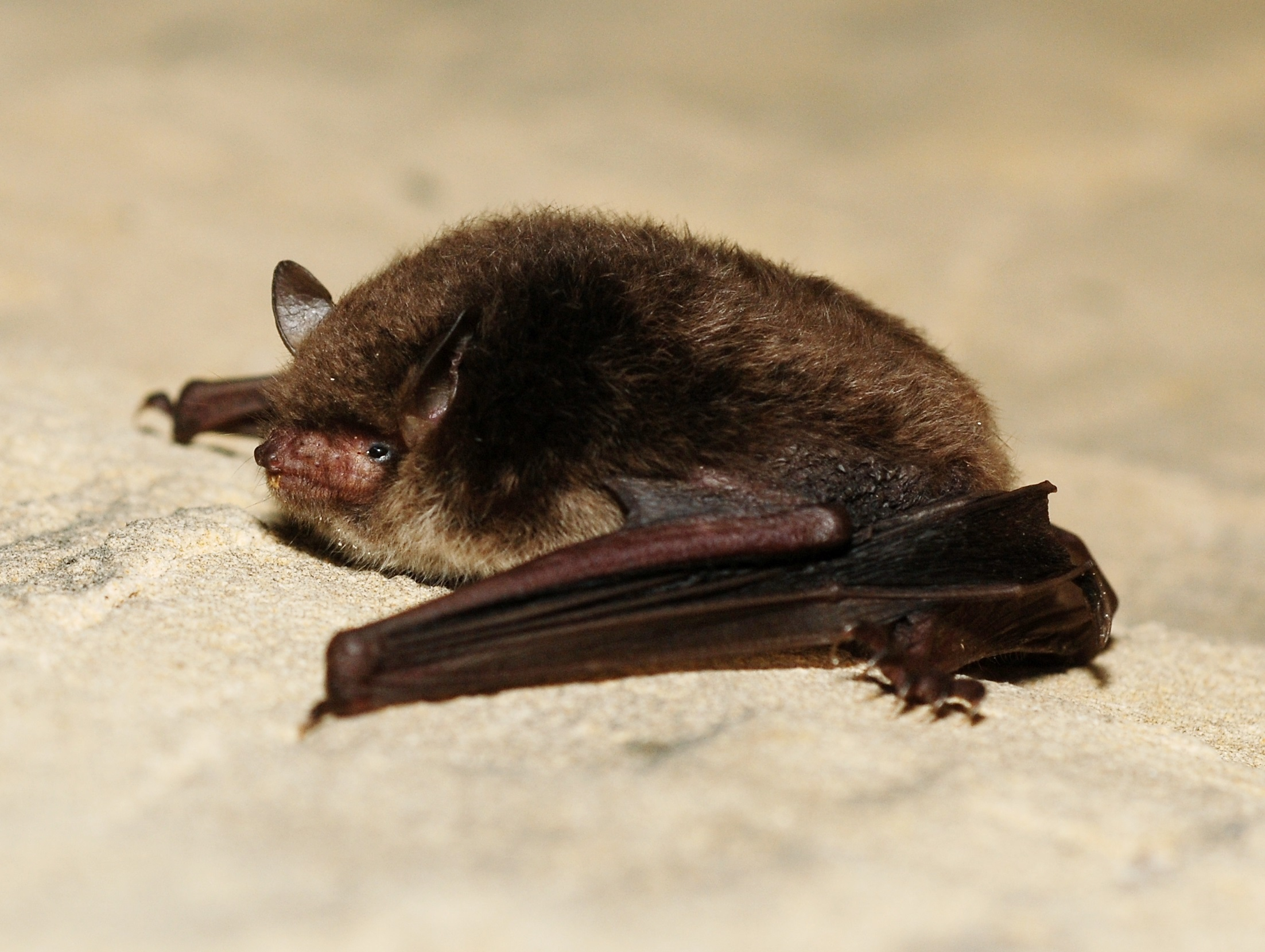 Myotis daubentoni